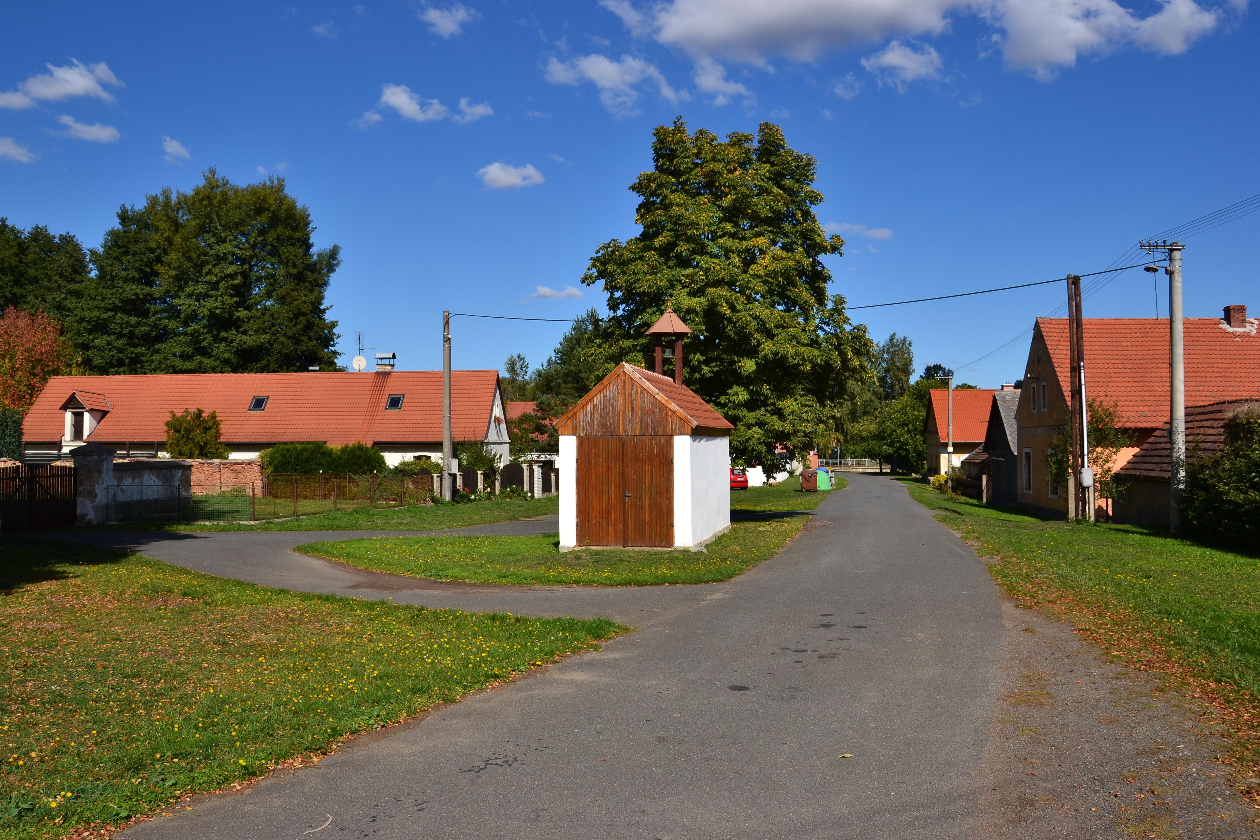 Náves